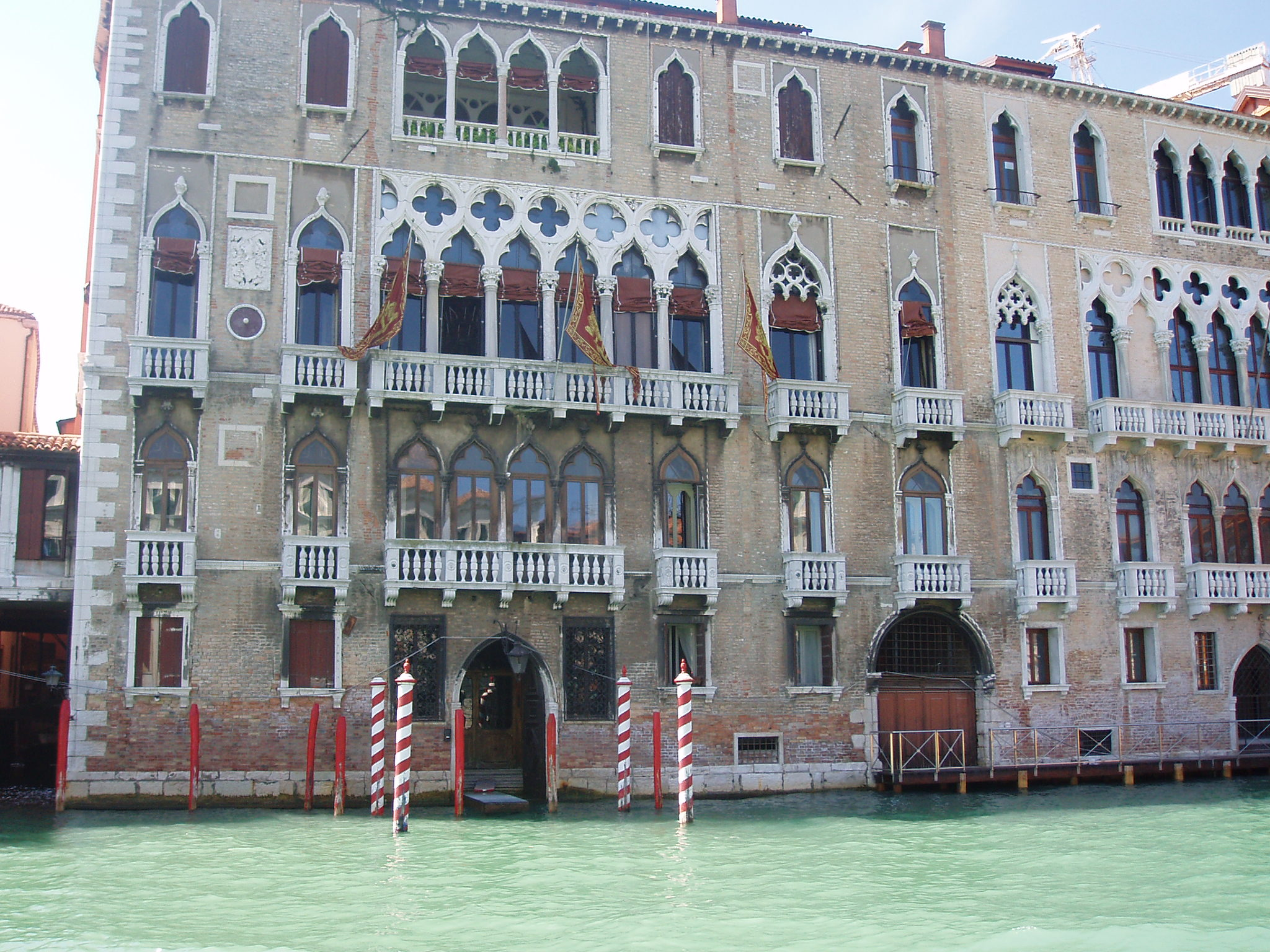 venise pal giustinian